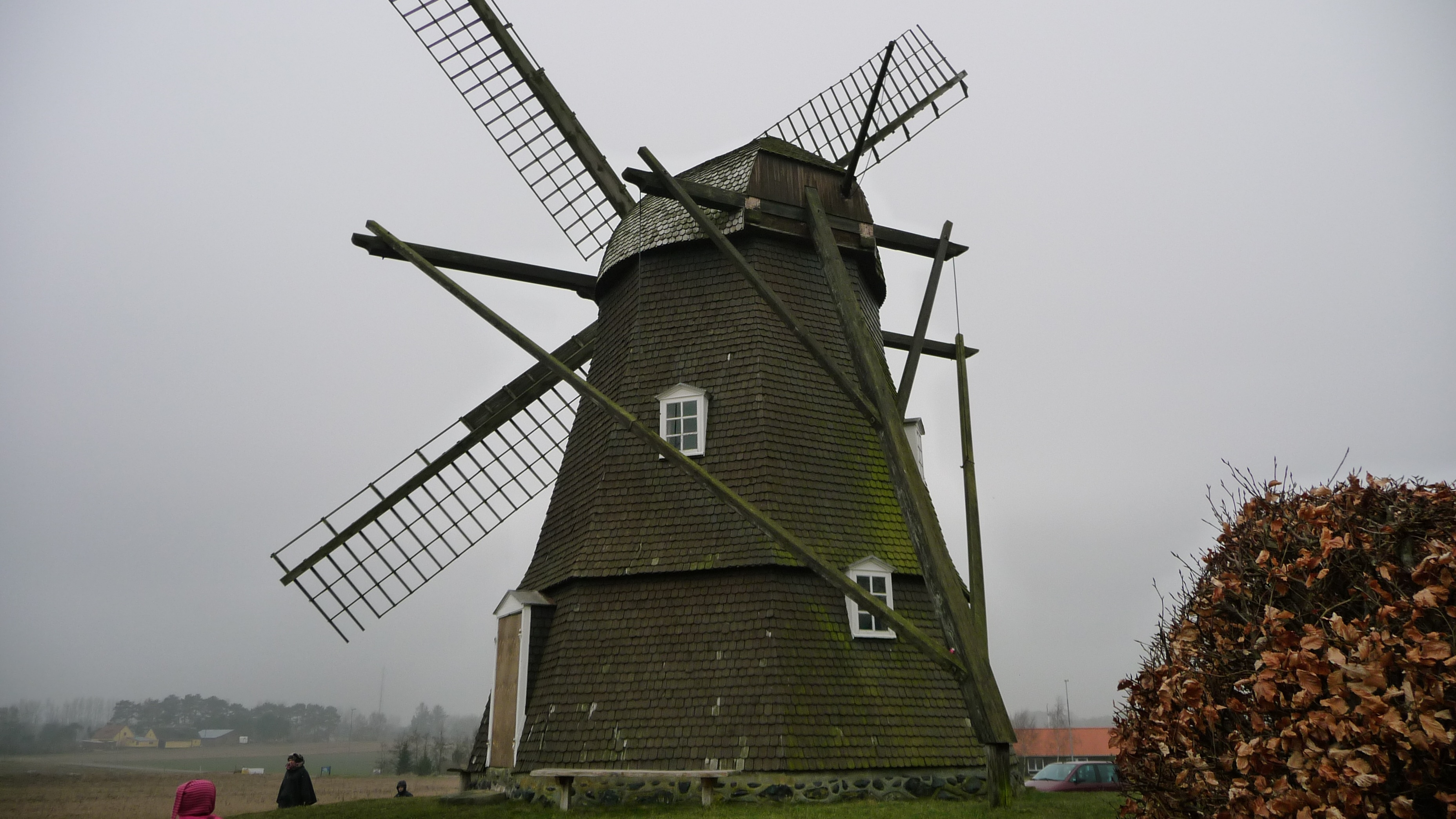 Rørvig Mølle i Odsherred, Danmark